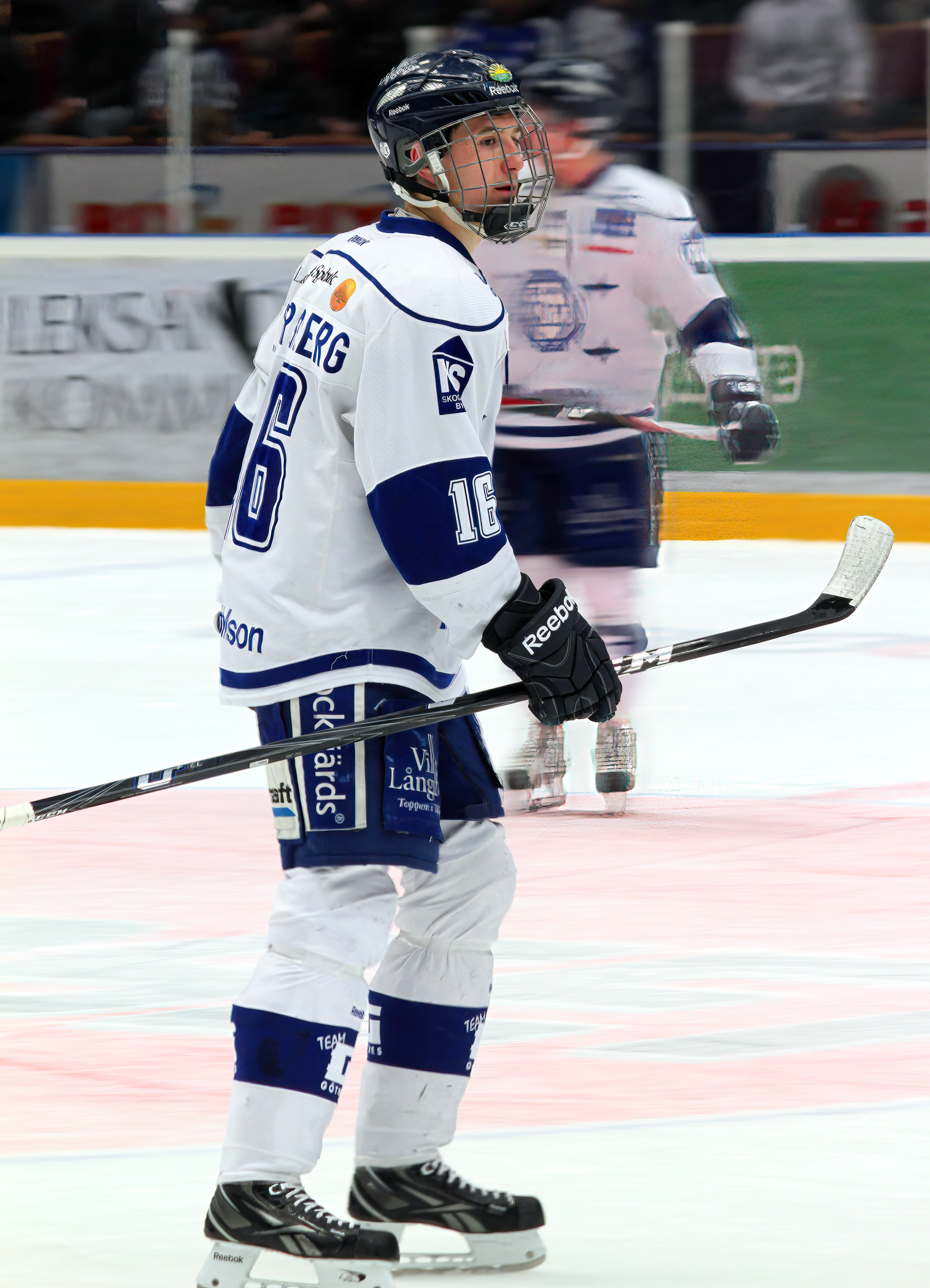 Filip Forsberg i kvalmatchen mellan Leksands IF och Djurgårdens IF i Leksand 2012-03-31.